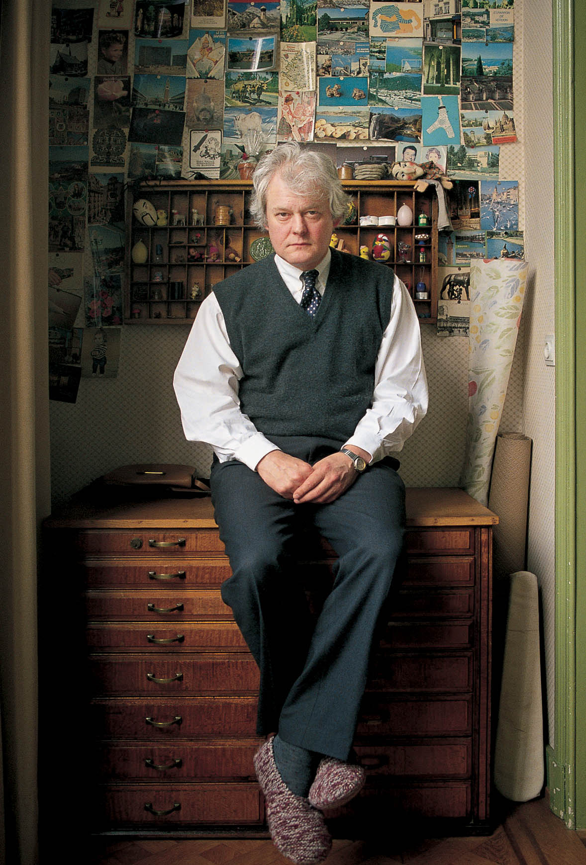 Schrijver, dichter en essayist Geert van Istendael.